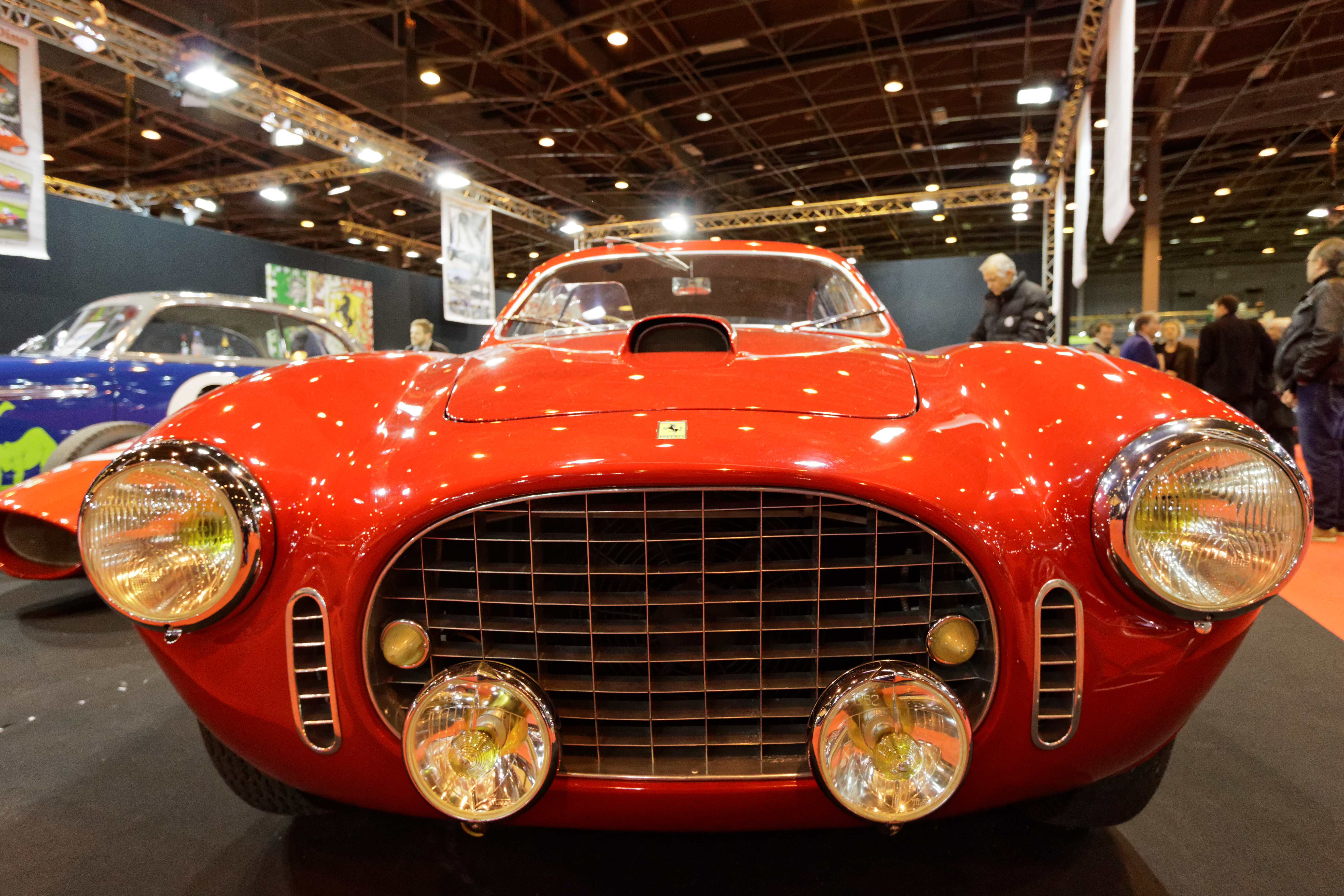 Une Ferrari 250 Sport de 1952 exposée lors du salon Rétromobile 2016.